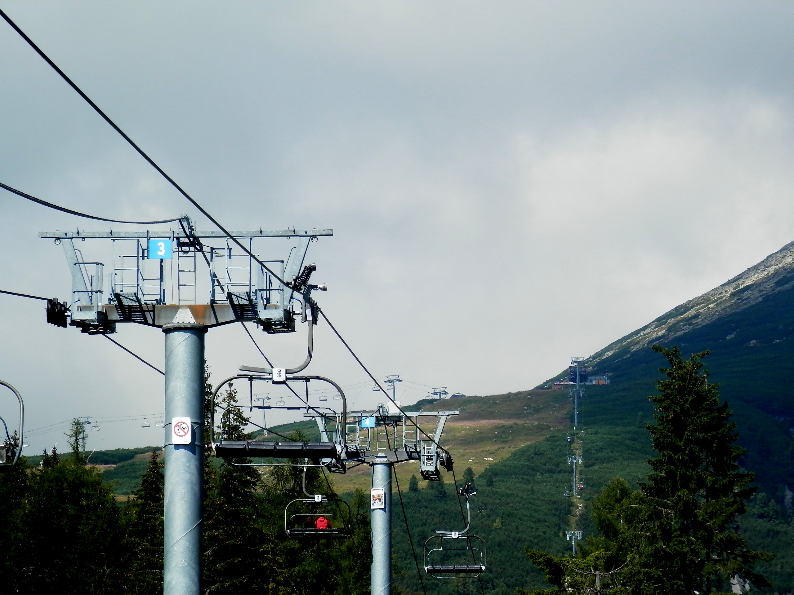 Lyžiarsky areál FIS. Vysokohorská osada s názvom Štrbské Pleso. Leží v nadmorskej výške asi 1 350 metrov. Obec Štrba, okres Poprad. Leto 2016